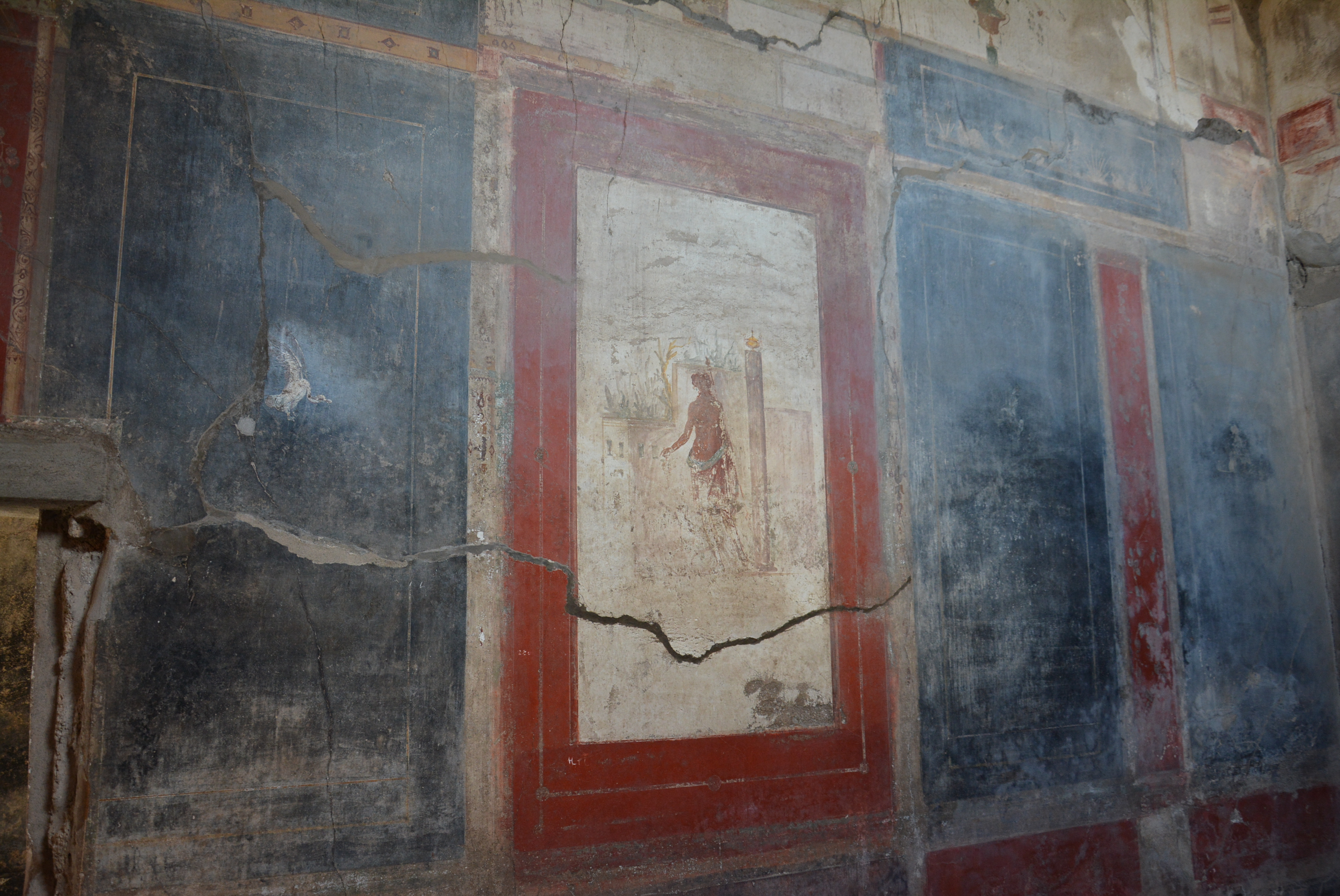 Casa dei Ceii - MIBACT This is a photo of a monument which is part of cultural heritage of Italy.